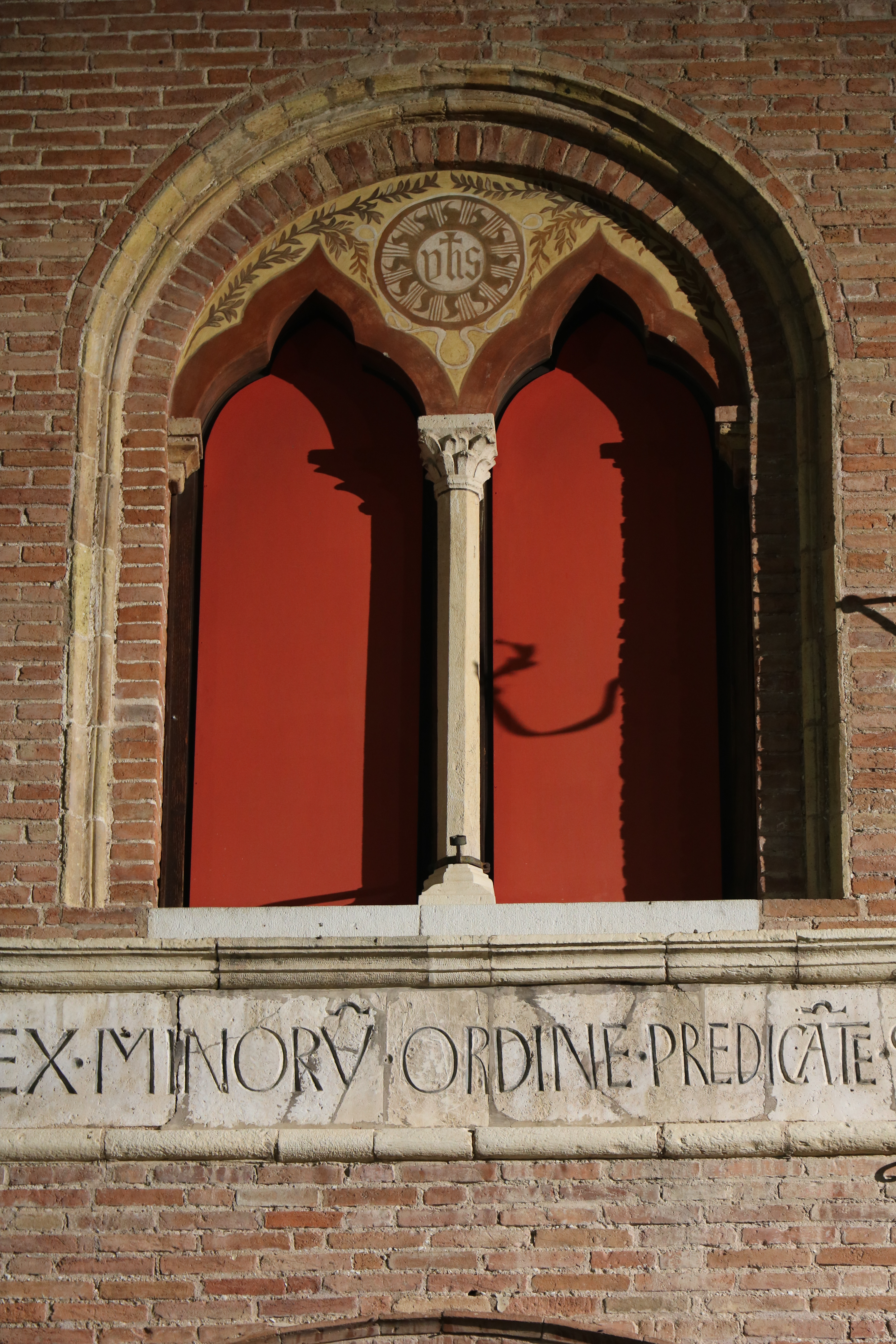 Spedale Santa Maria del Buon Gesù (Pinacoteca civica "Bruno Molajoli") This is a photo of a monument which is part of cultural heritage of Italy.